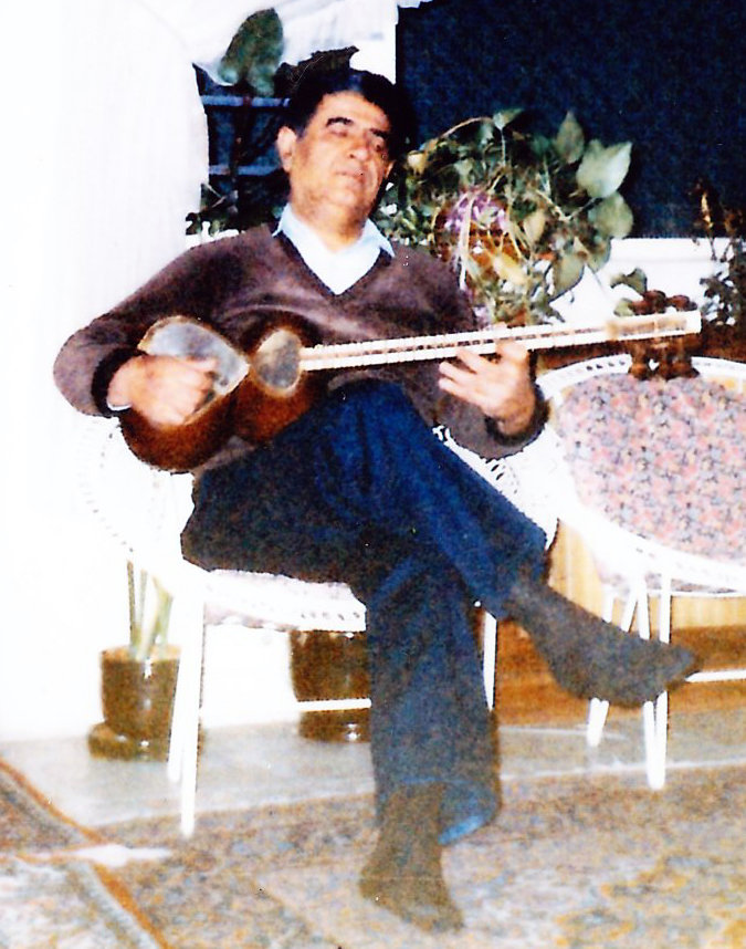 تصویر جعفرپورهاشمی در زمستان ۷۲ در منزل شخصی اش